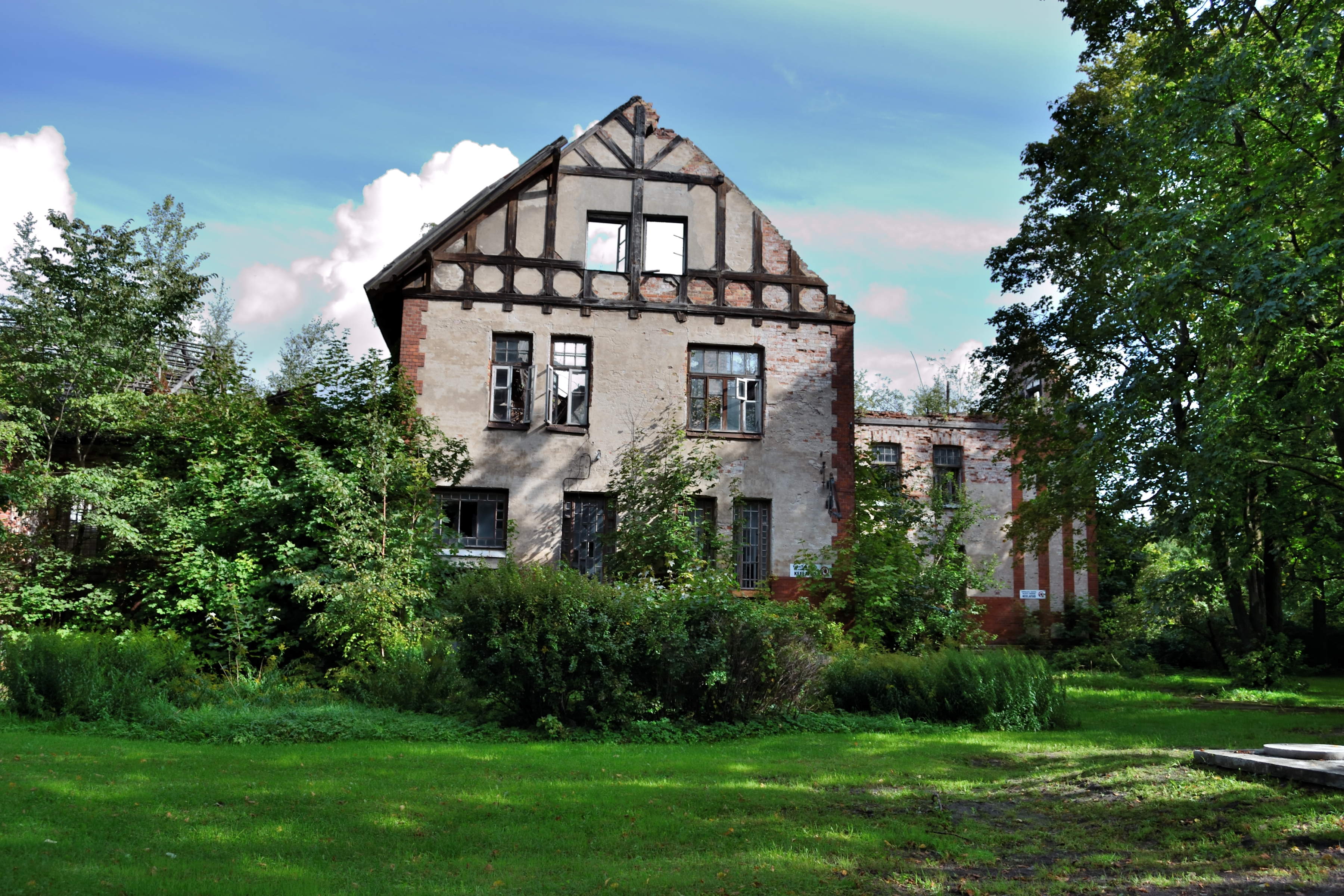 Tallinn, Seewaldi vaimuhaigla ravikorpus Paldiski mnt 52-2, 1909